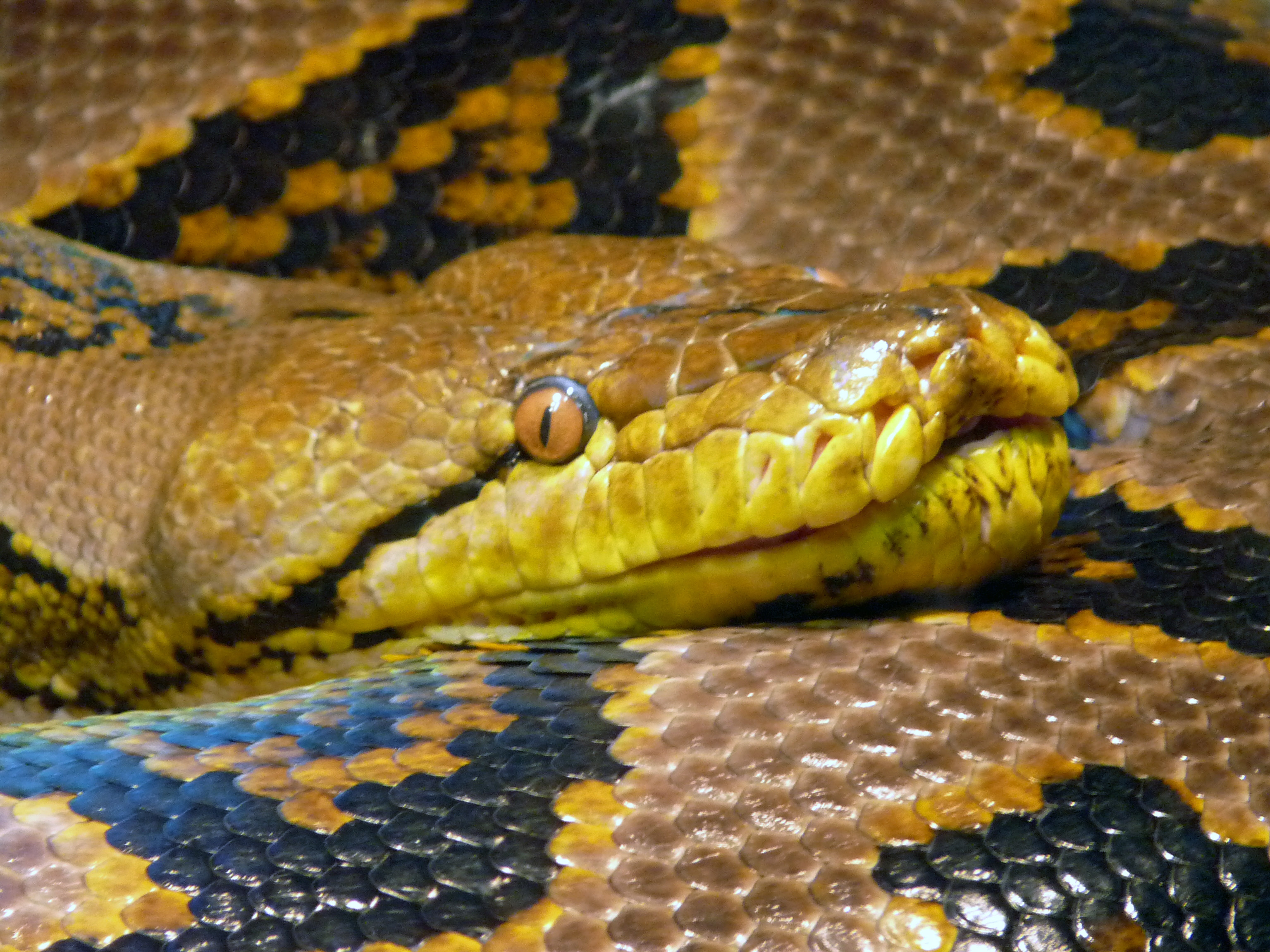 Kop van Python reticulatus/Netpython. Foto gemaakt in Serpentarium Blankenberghe BELGIUM. Natuurlijk biotoop: regenwouden van Azië.